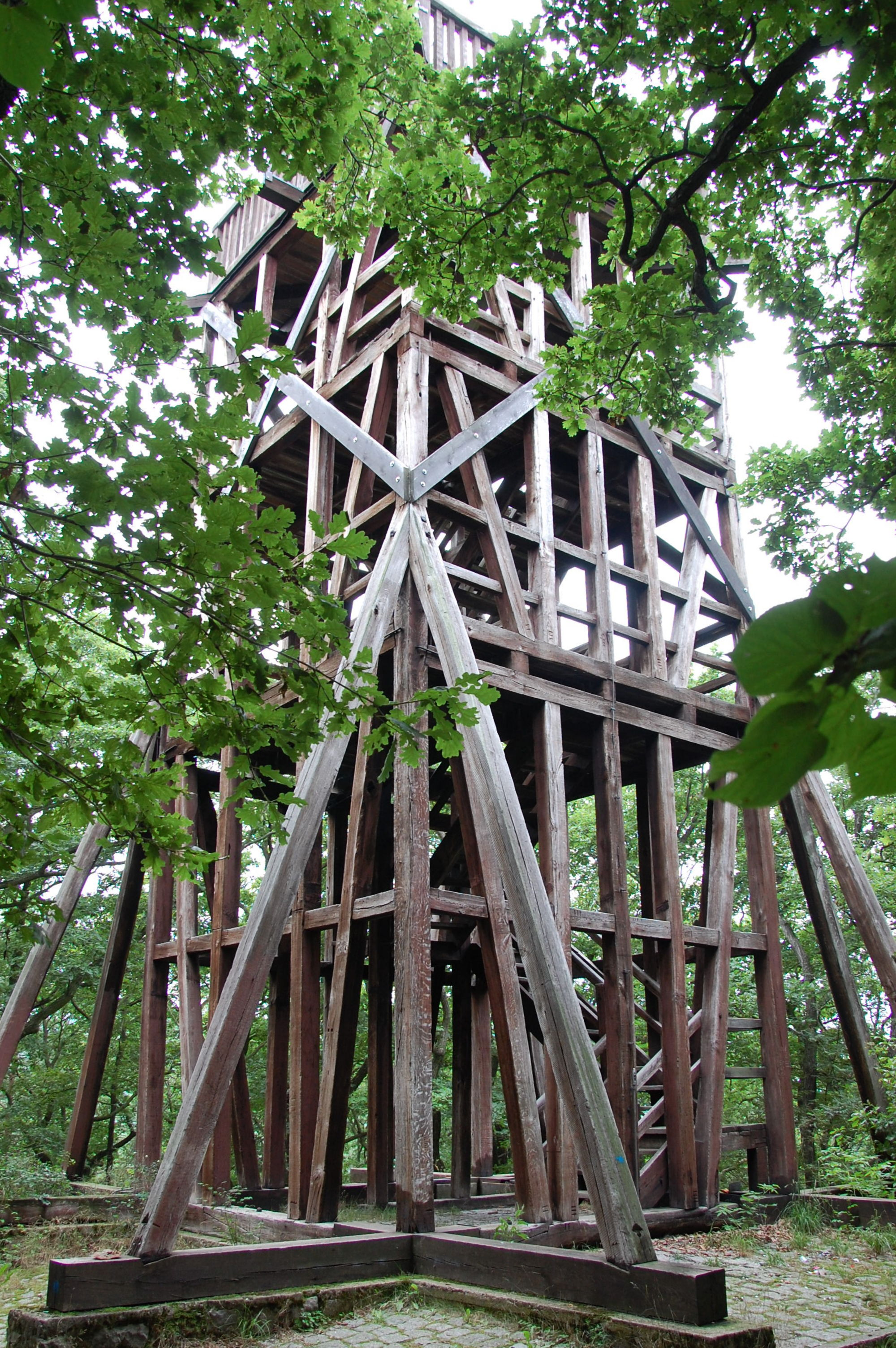 Preußenturm Bad Suderode